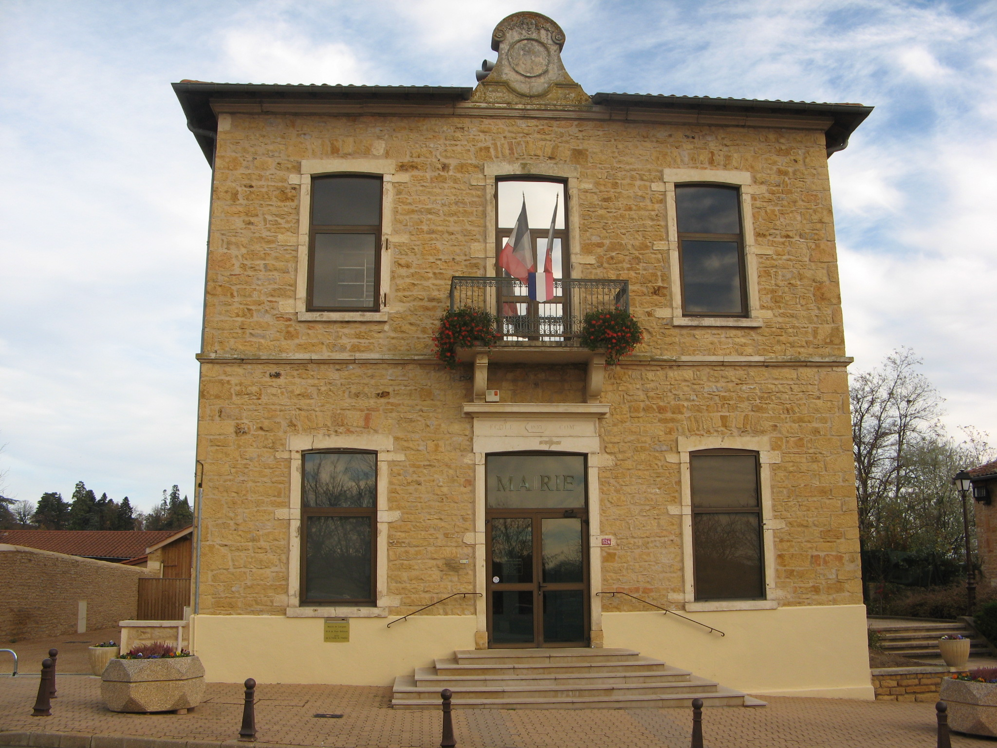 Vue de la mairie de Liergues - Département du Rhône.